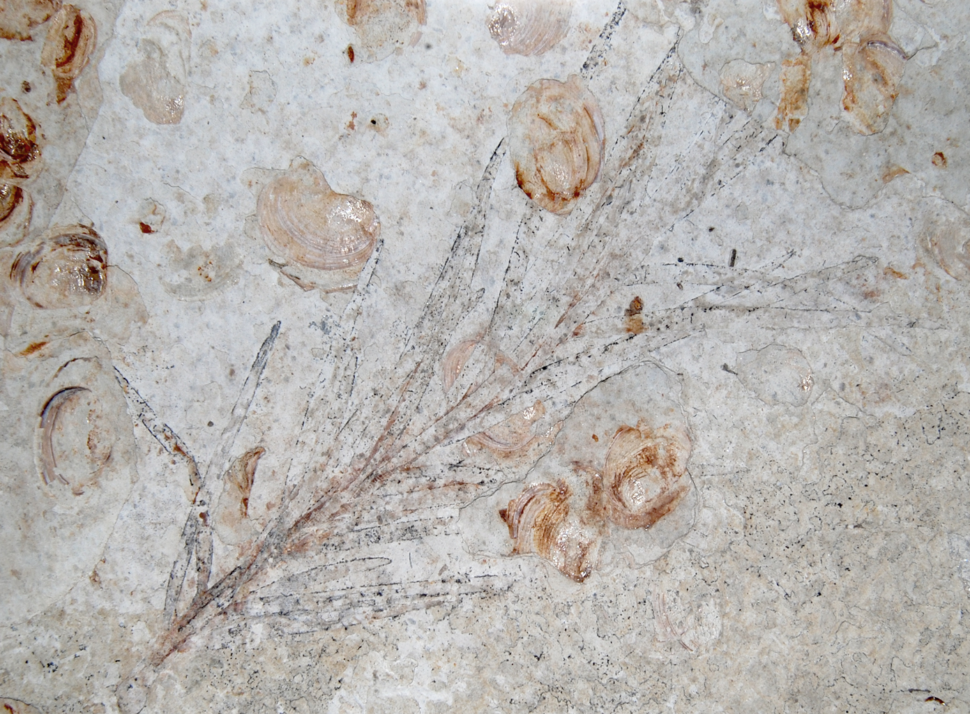 Naturhistorisches Museum Wien